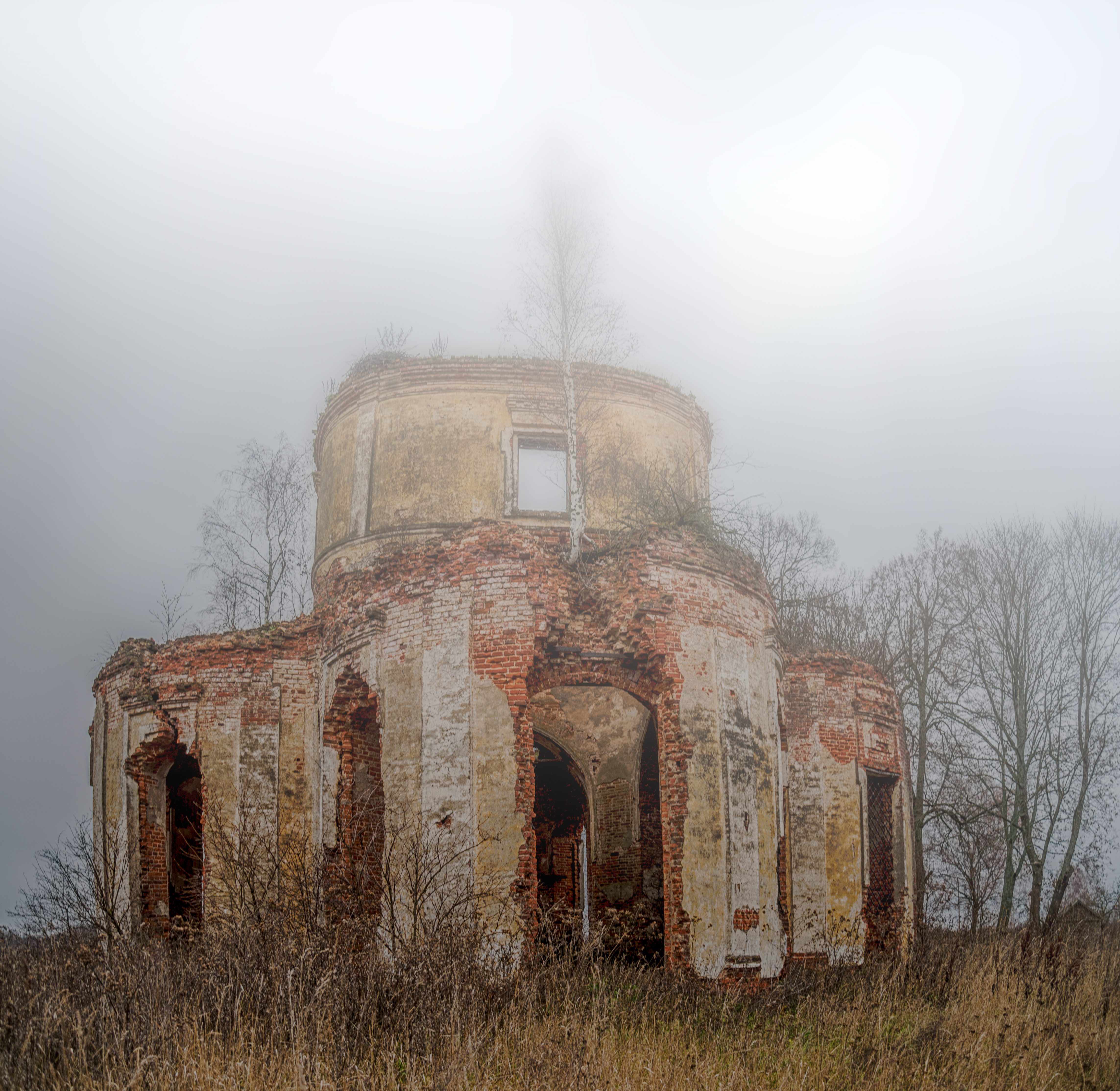 Церковь Успения: Палкино, Краснинский район, Смоленская область